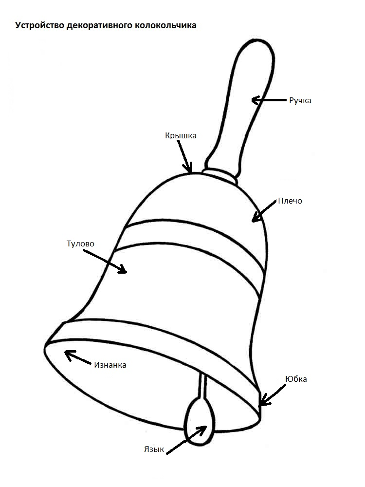 Устройство декоративного колокольчика